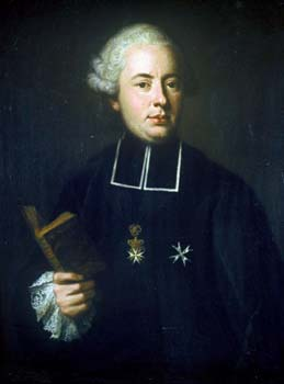 Gemälde: Der Benediktiner und Schulreformer Heinrich Braun (1732-1792)